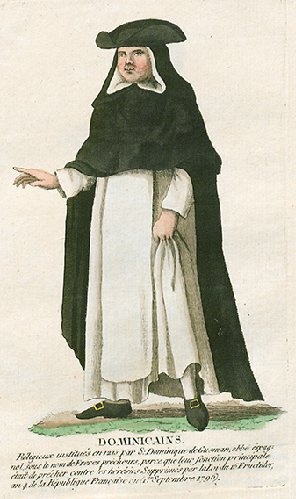 Collection de costumes de tous les ordres monastiques, supprimés à differentes époques, dans la ci-devant Belgique, Bruxelles, Philippe Joseph Maillart et sœur, 1811